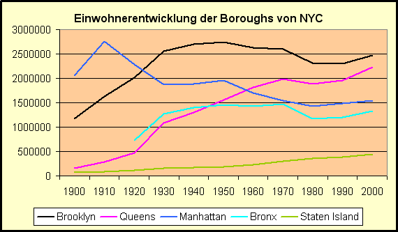 Quelle Zahlen: aus den entsprechenden Boroughs der englischen Wiki entnommen Grafik erstellt: Berthold Probst